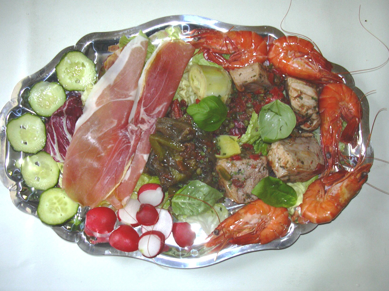 antipasti